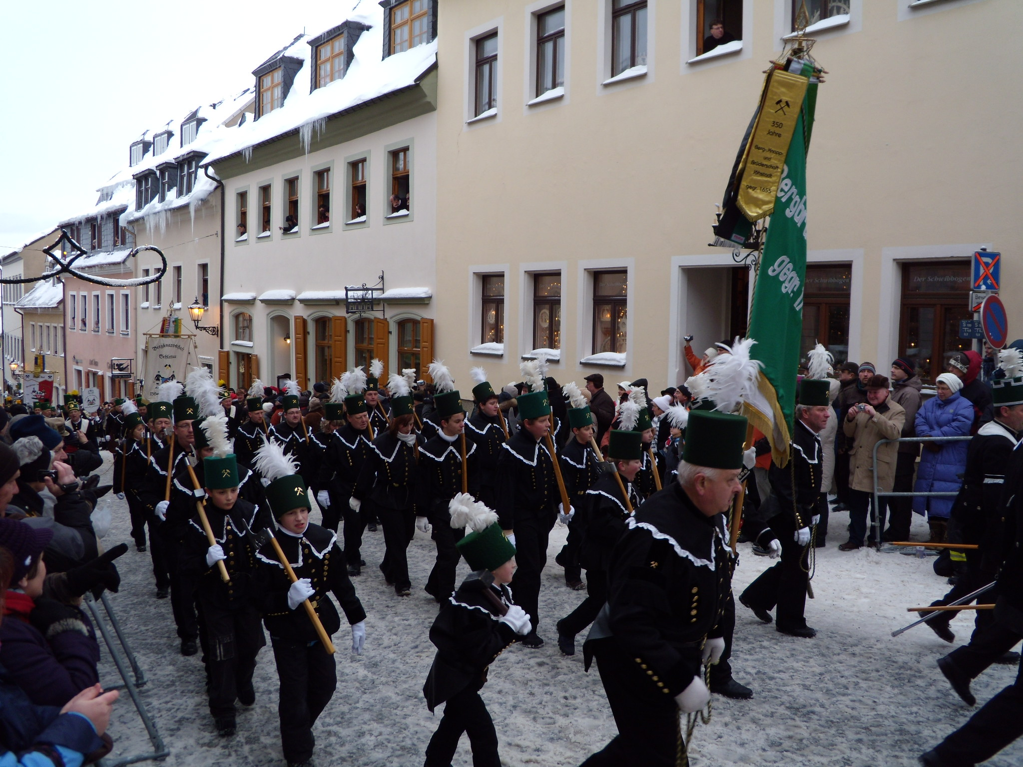 Bergparade in Annaberg-Buchholz